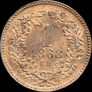 20 krajczár 1868 - reverse